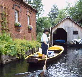 Postzustellung auf dem Wasserweg in Lehde (Spreewald), Land Brandenburg, Deutschland